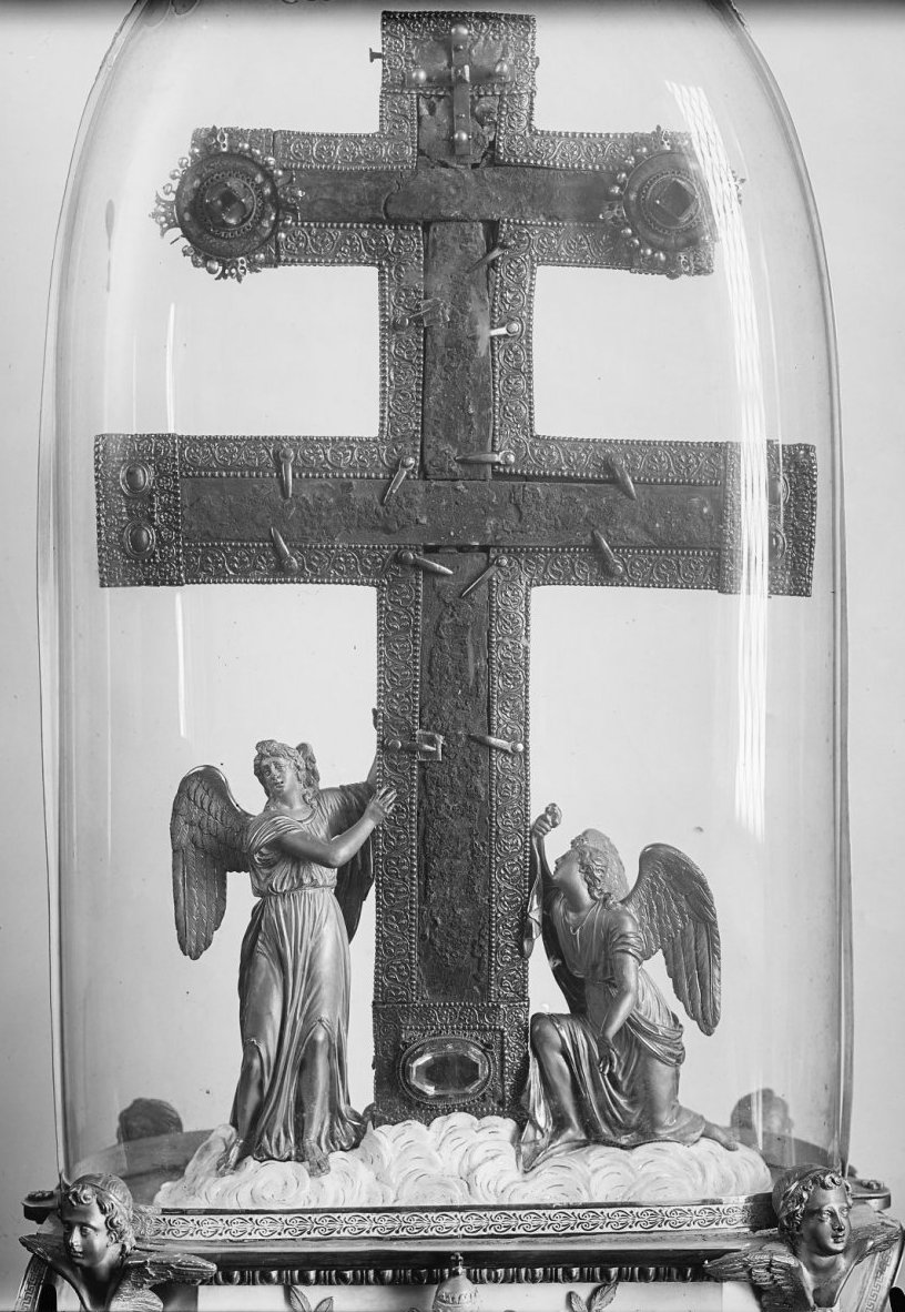 "Patriarchaalkruis" van ca. 1204 tot 1837 in de schatkamer van de Onze Lieve Vrouwekerk, thans te Rome